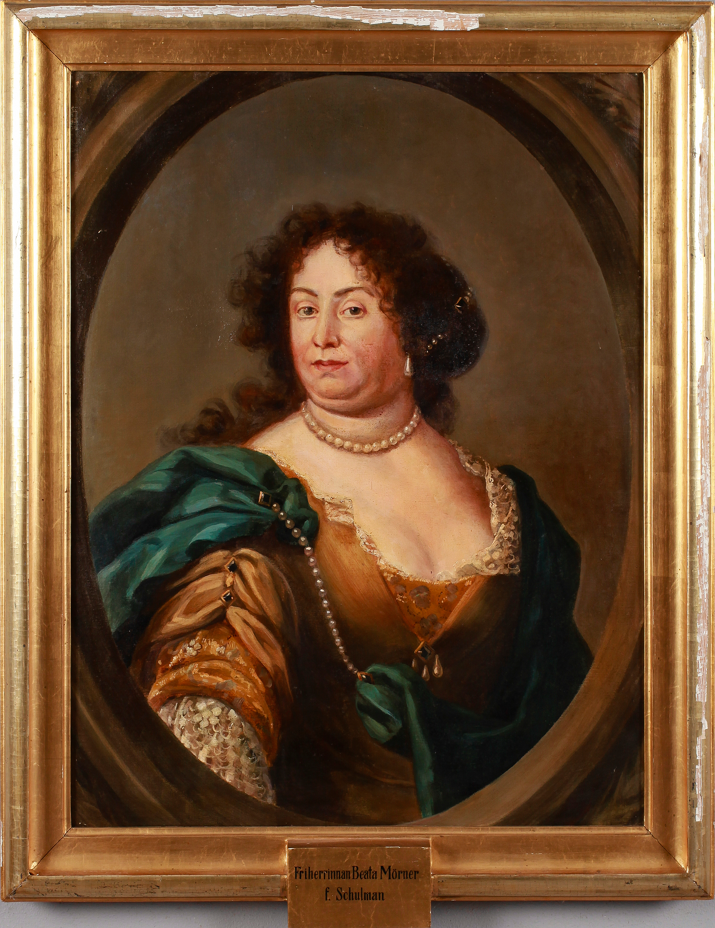 Beata Mörner af Morlanda (1630-1706), gift Schulman. Okänd konstnär.